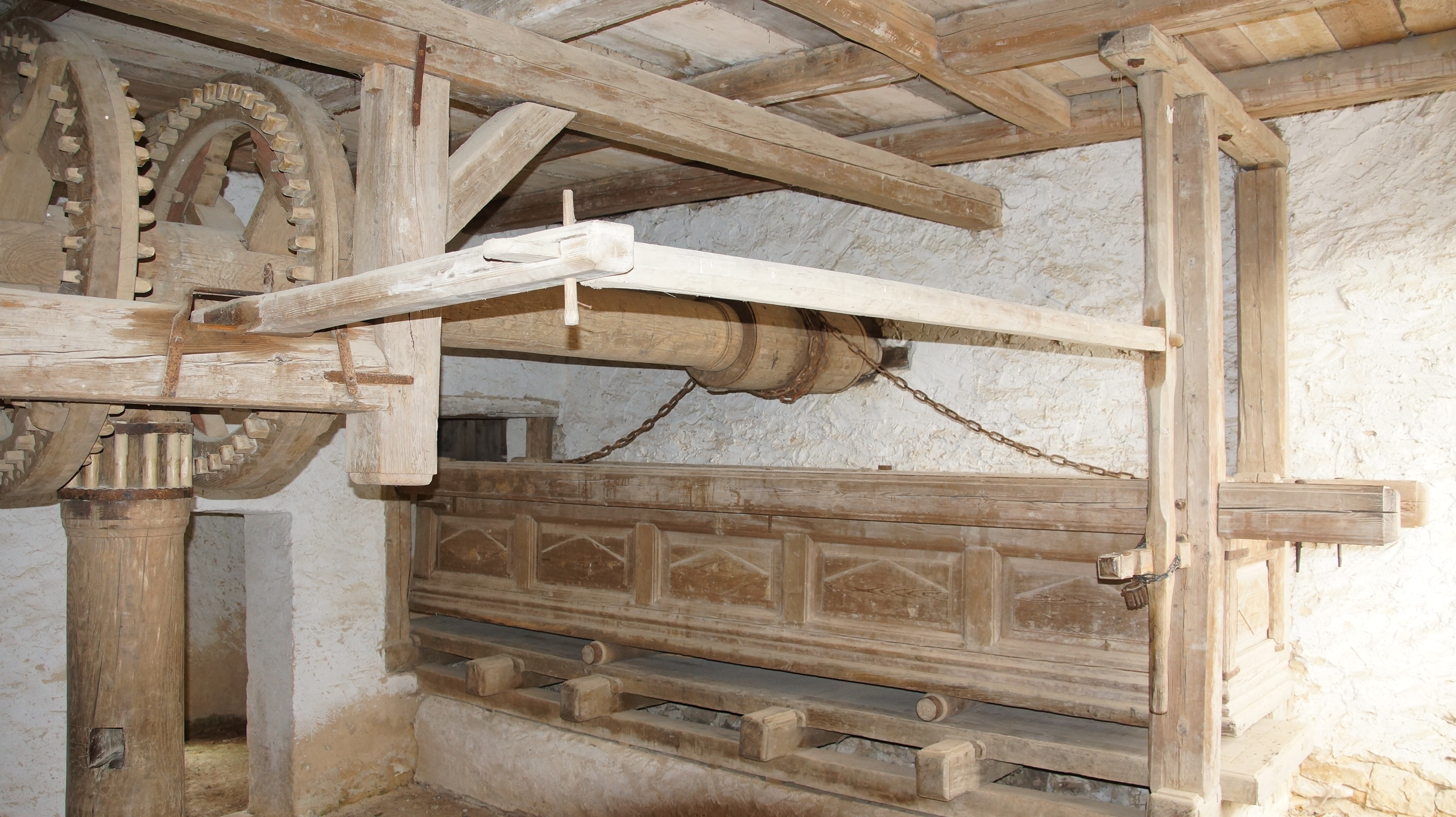 Kaltmang aus Heidenheim, heute im Fränkischen Freilandmuseum des Bezirks Mittelfranken in Bad Windsheim. Frühes 19. Jahrhundert. Der Göpel ist älter als 1842 und wurde wahrscheinlich vom ersten Heidenheimer Färbermeister schon gebraucht übernommen